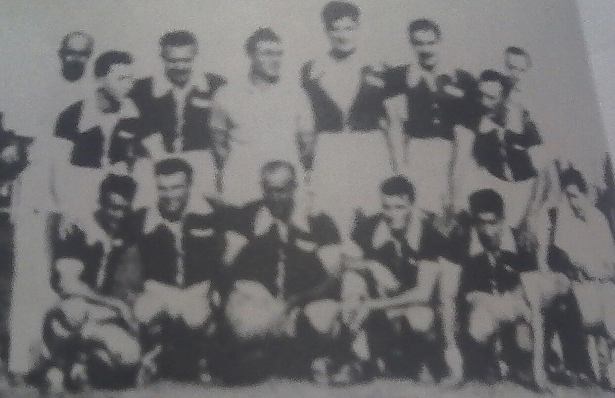 Campeones 1953.